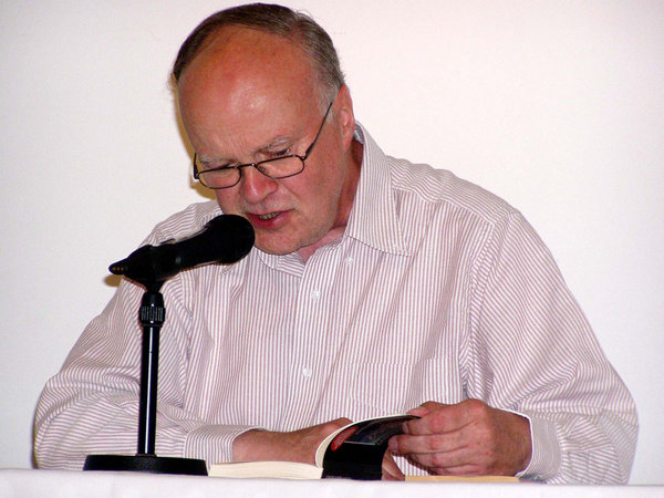 Krimiautor Jürgen Ehlers bei einer Krimilesung in der Katholischen Landvolkshochschule „Schorlemer Alst“